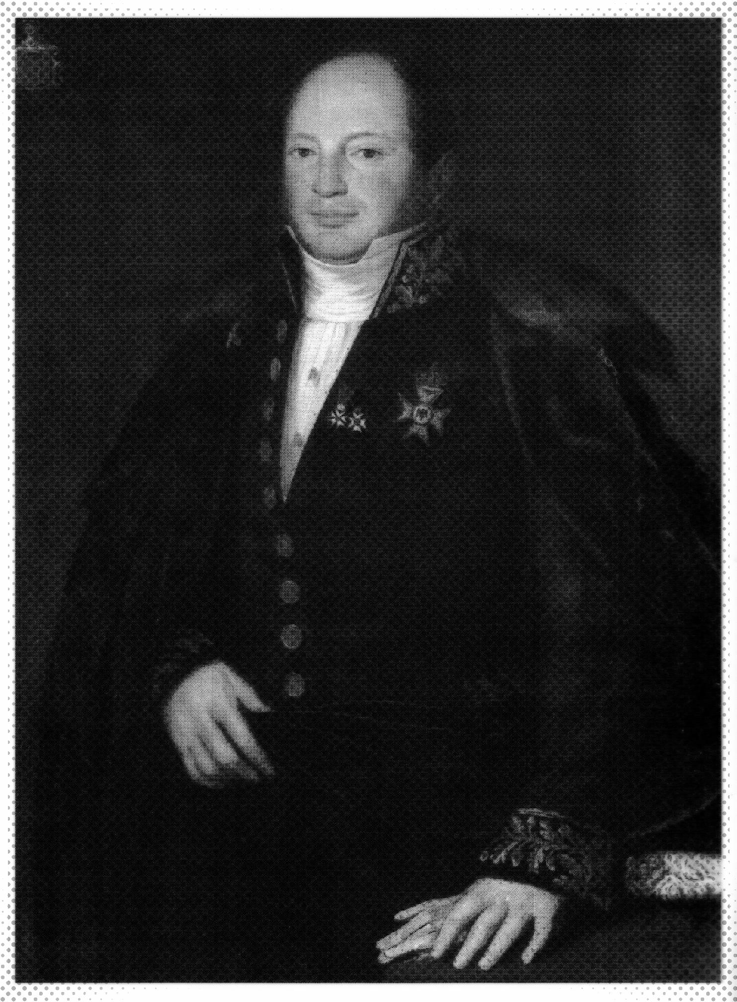 Frans Karel Anton baron de Loë-Imstenraedt